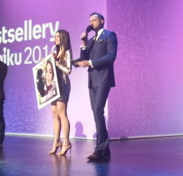 Polska piosenkarka Monika Lewczuk i dziennikarz Marcin Prokop.